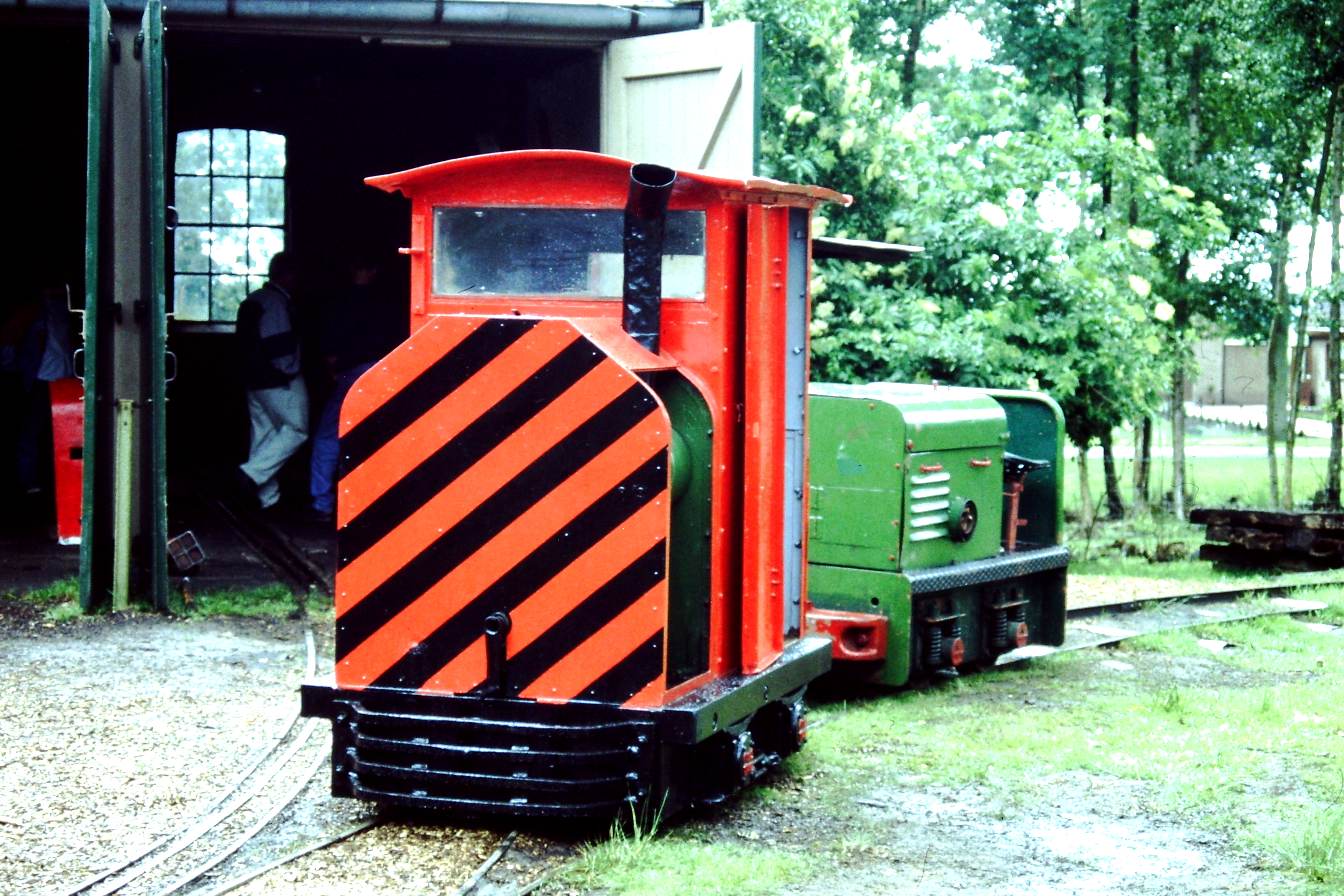 Industrieel Smalspoor Museum (ISM) locomotief 55 van het type Moës.